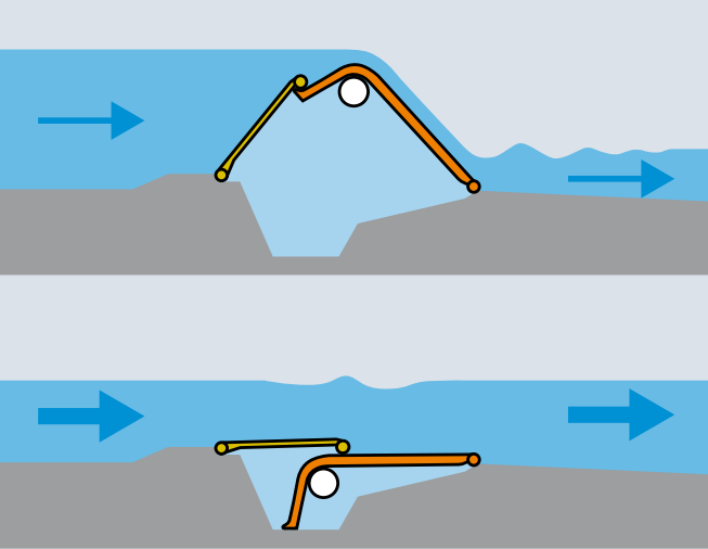 oben: angehobenes Dachwehr, unten: abgesenktes Dachwehr